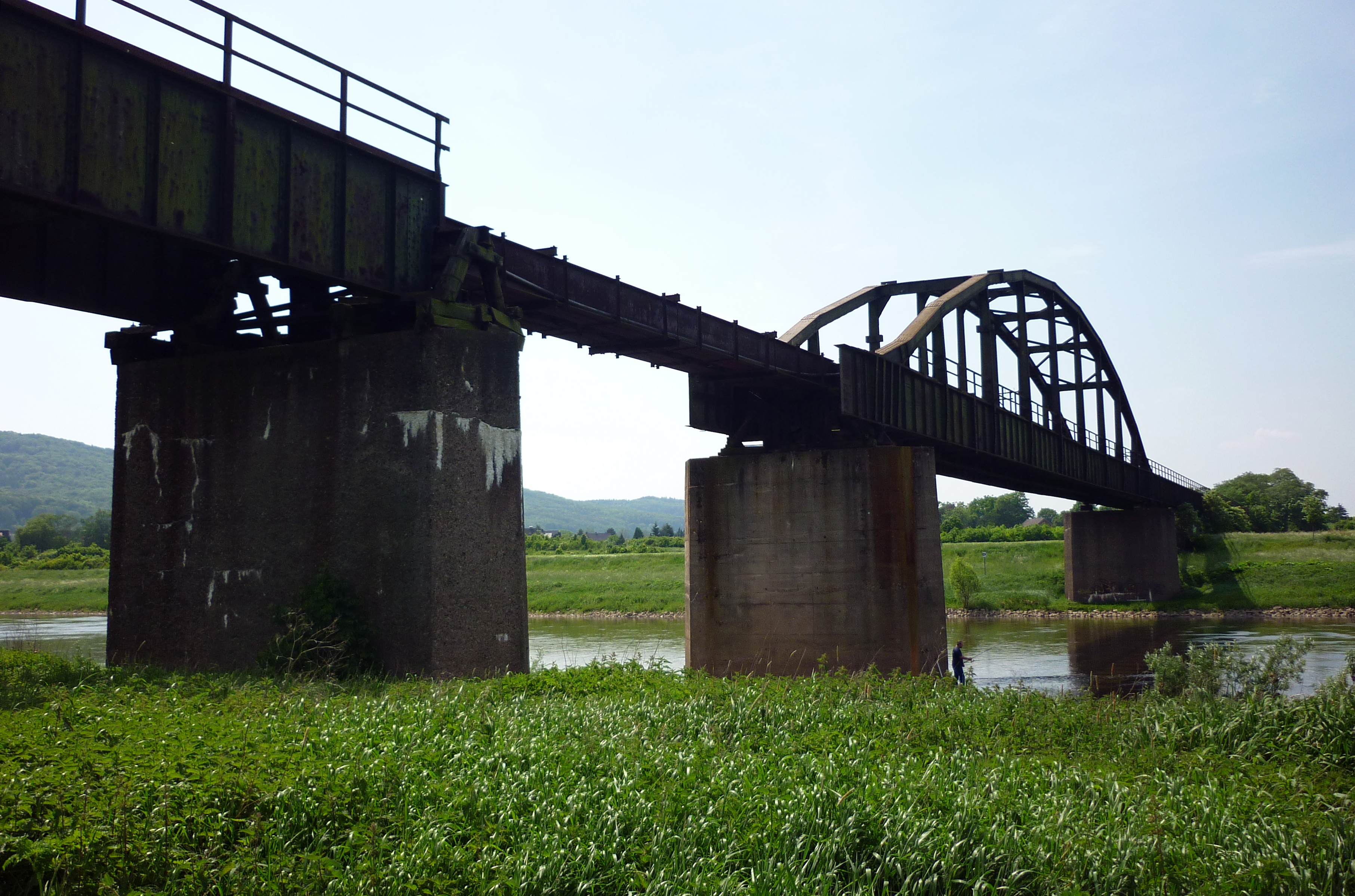 Porta Westfalica. Eisenbahnbrücke der ehemaligen Strecke nach Häverstädt über die Weser. Die Brücke ist weder begeh- noch befahrbar.